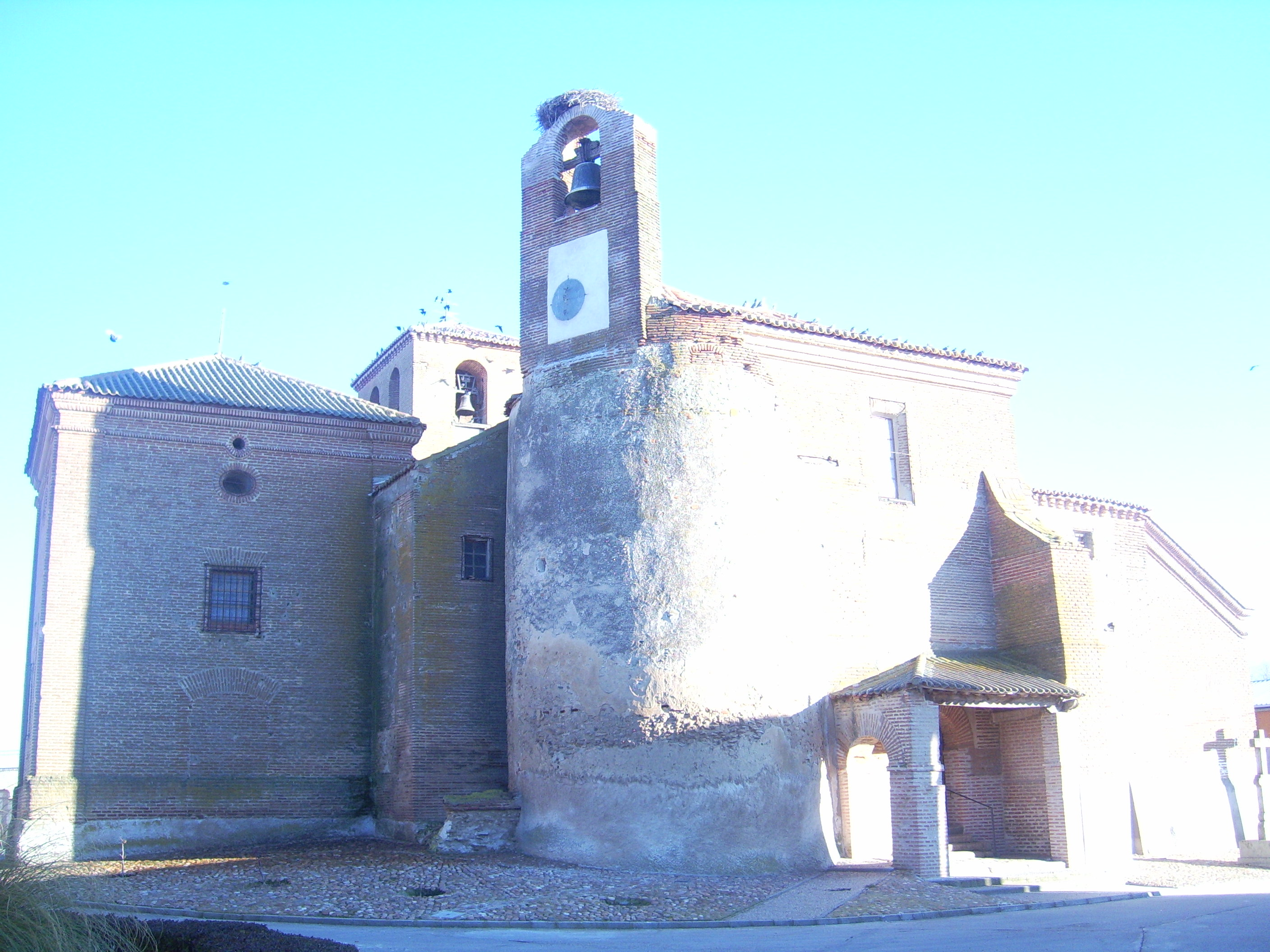 Iglesia parroquial de Nuestra Señora de la Asunción en Fuentes de Año (provincia de Ávila).